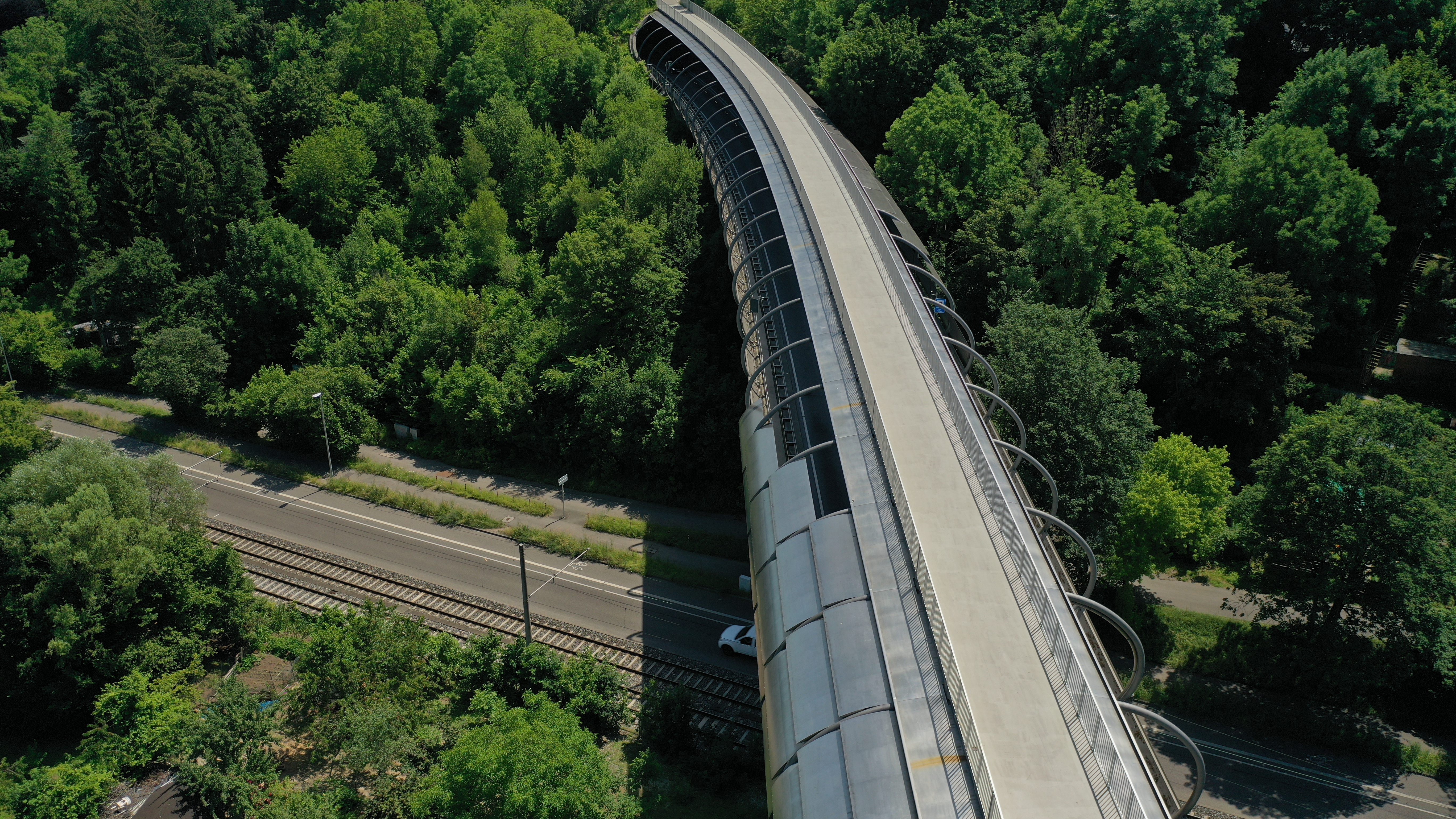 Vaihinger Viadukt aus nördlicher Richtung